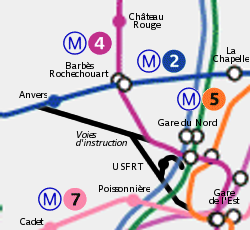 Extract from Image:Paris Metro map.gif, idea from Image:Haxo (Paris Metro).png by User:Superbfc. en: Locations of Paris Nord USFRT instruction lines. fr: Localisation de la station fantôme du métro de Paris Paris Nord USFRT, voies d'instruction.